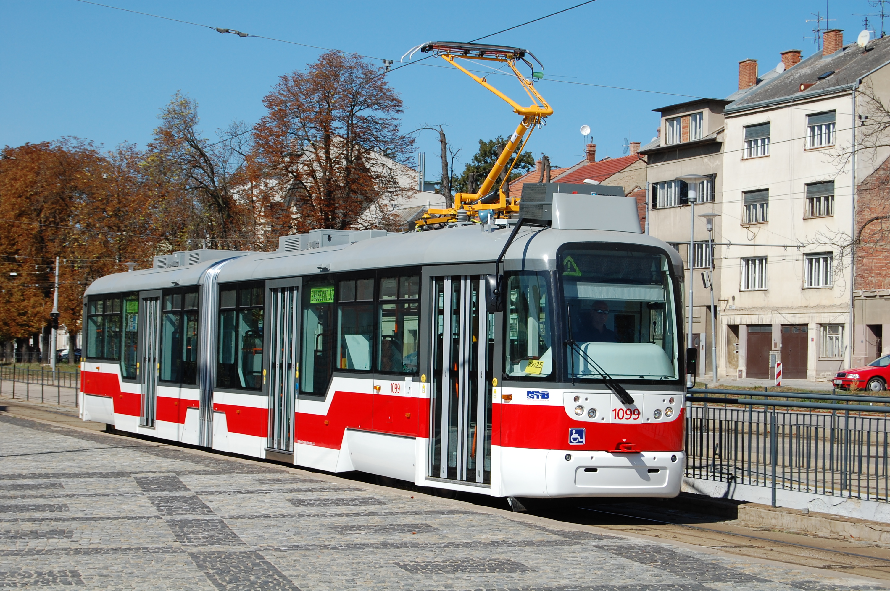 Nová brněnská tramvaj Vario LF2